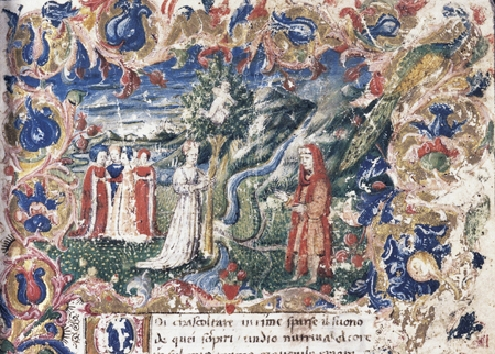 Petrarch, Laura, and Cupid (from Bibliotheca Nazionale Centrale di Roma MS Varia 3, ca. 1444)